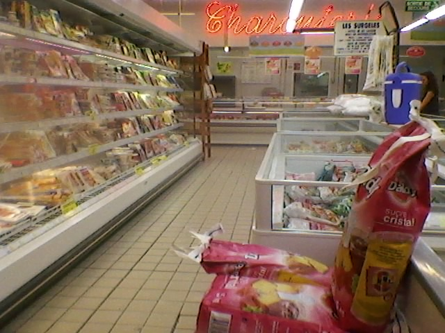 Intérieur d'un Supermarché (Maxi-Marché)